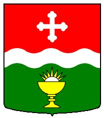 Wappen von Ferden Kanton Wallis Schweiz